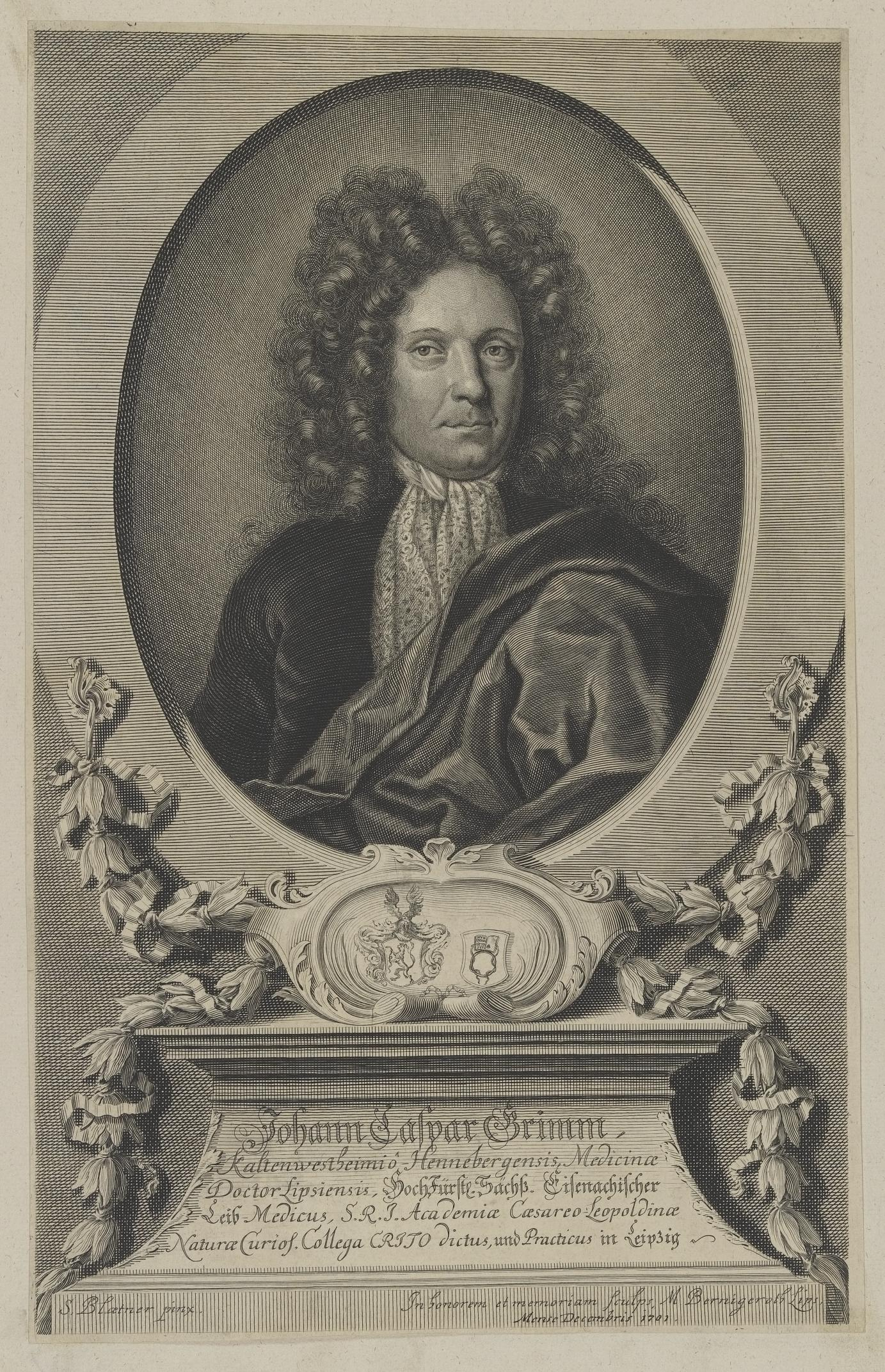 Johann Caspar Grimm, Kaltenwestheimio-Hennebergensis, Medicinae Doctor Lipsiensis, Hochfürstl. Sächß. Eisenachischer Leib-Medicus, S. R. I. Academiae Caesareo-Leopoldinae Naturae Curios. Collega Crito dictus, und Practicus in Leipzig